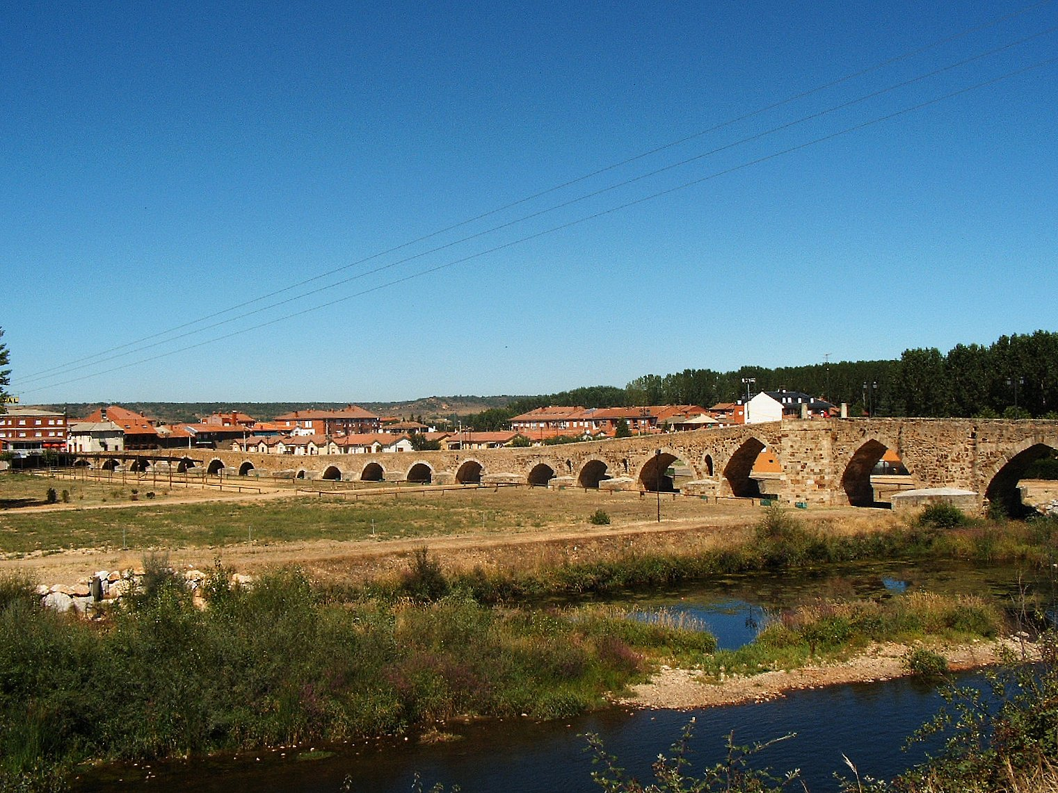 Vista de Hospital de Órbigo (León, España) con el puente del Paso Honroso en primer término.